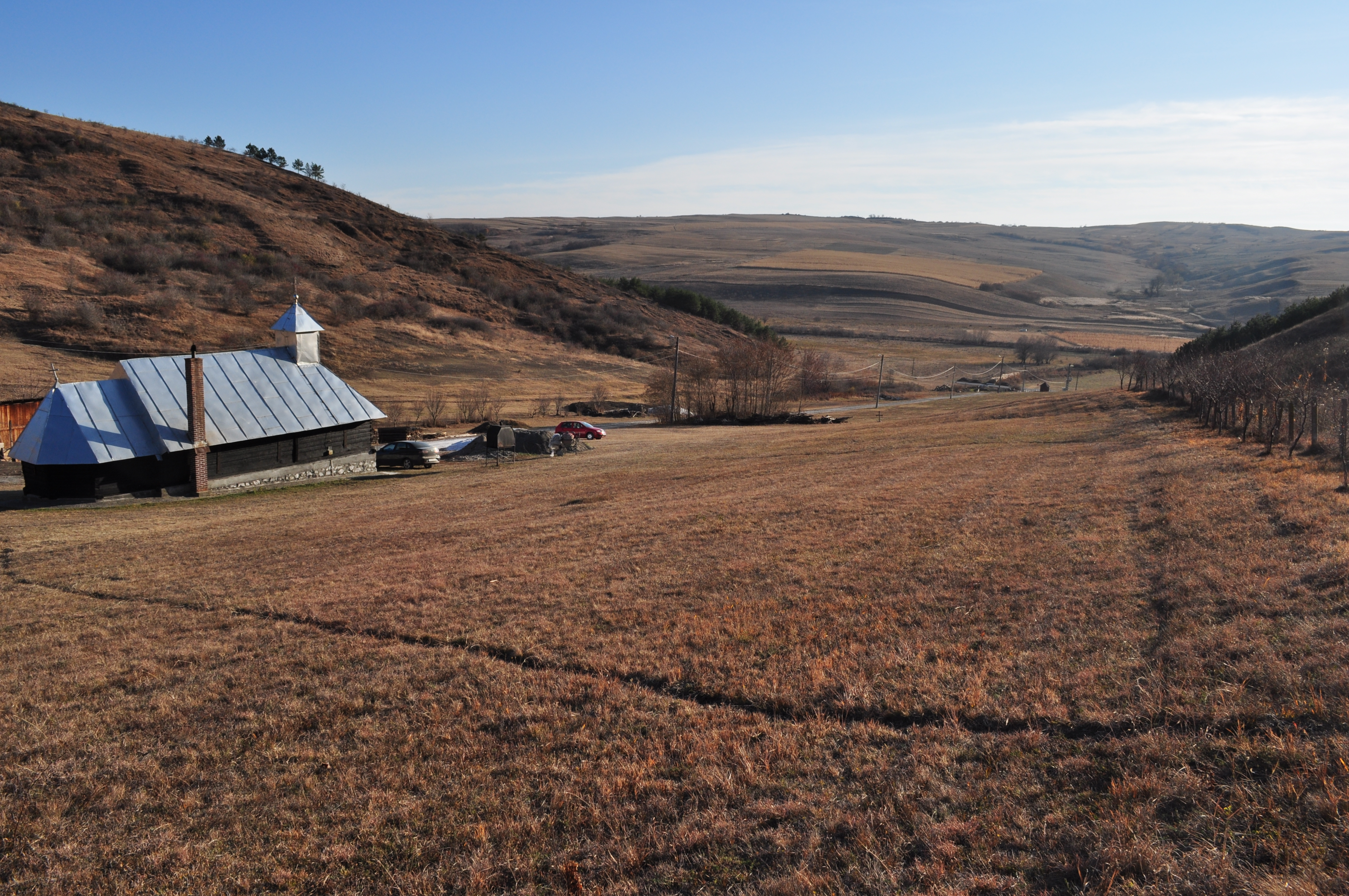 Biserica de lemn din Șilea mutată la Mănăstirea Fărău